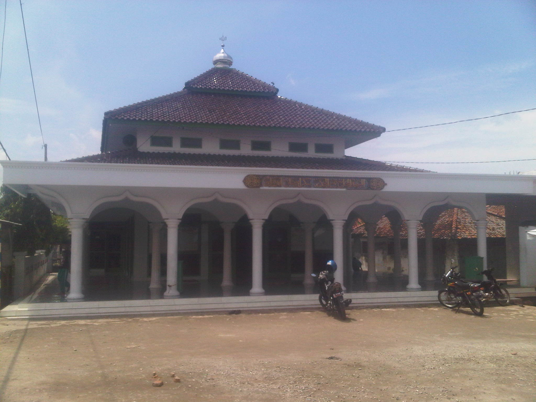 Masjid Nurul Hikmah